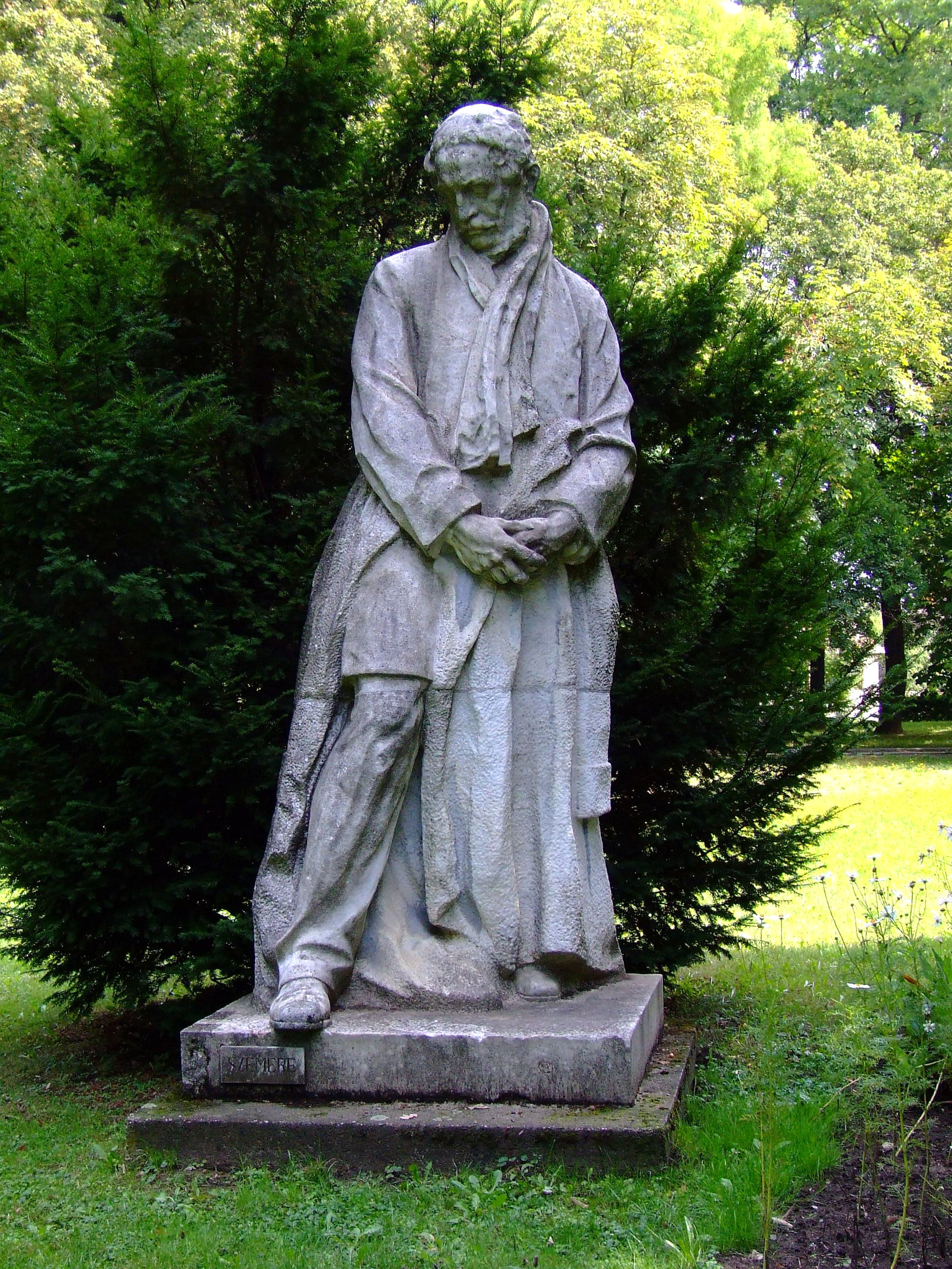 Szemere Bertalan szobra Dombóváron. Horvay János alkotása